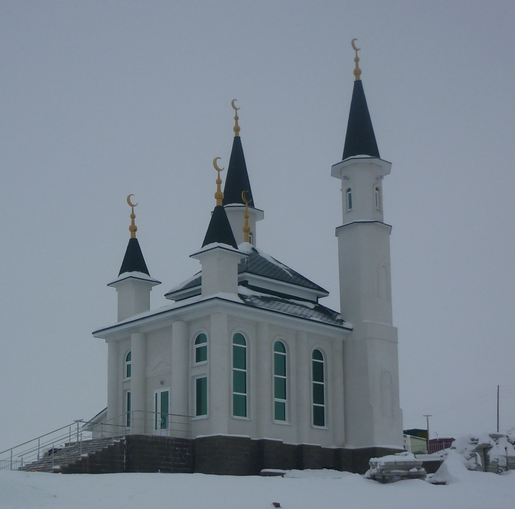 Башҡортса: Башҡоростан Республикаһы.Миәкә районы